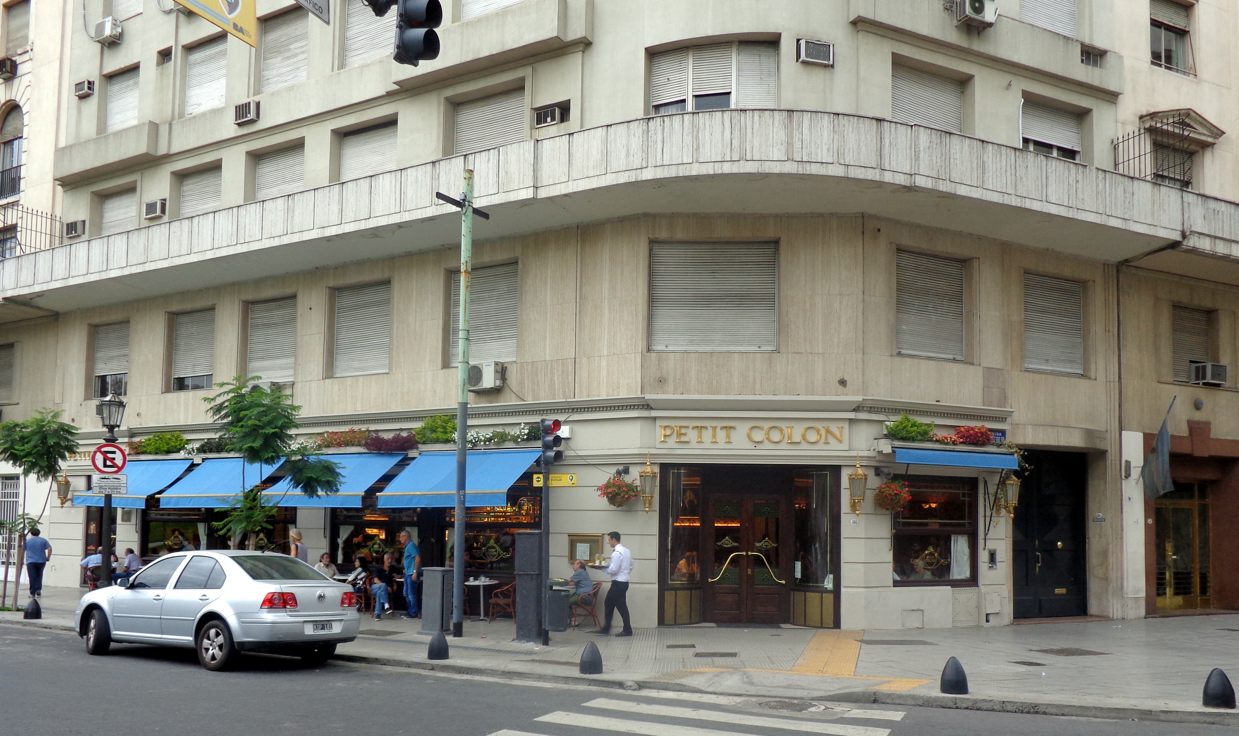 Petit Colón es un café y confitería notables situado en la esquina de las calles Lavalle y Libertad (Libertad 505), junto a la Roque Sáenz Peña (Diagonal Norte) en la ciudad de Buenos Aires, Argentina.